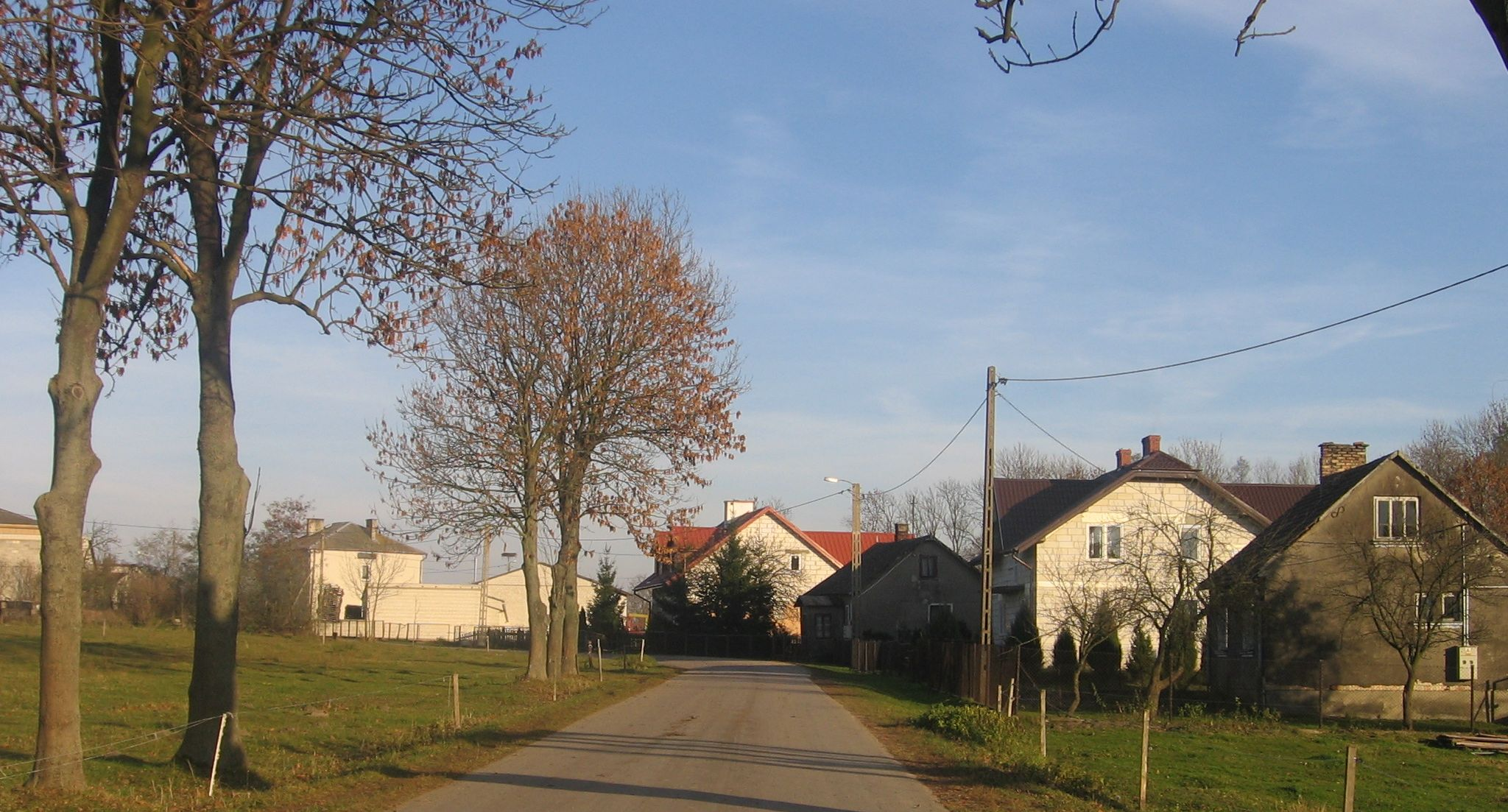 Zachodnia część wsi.